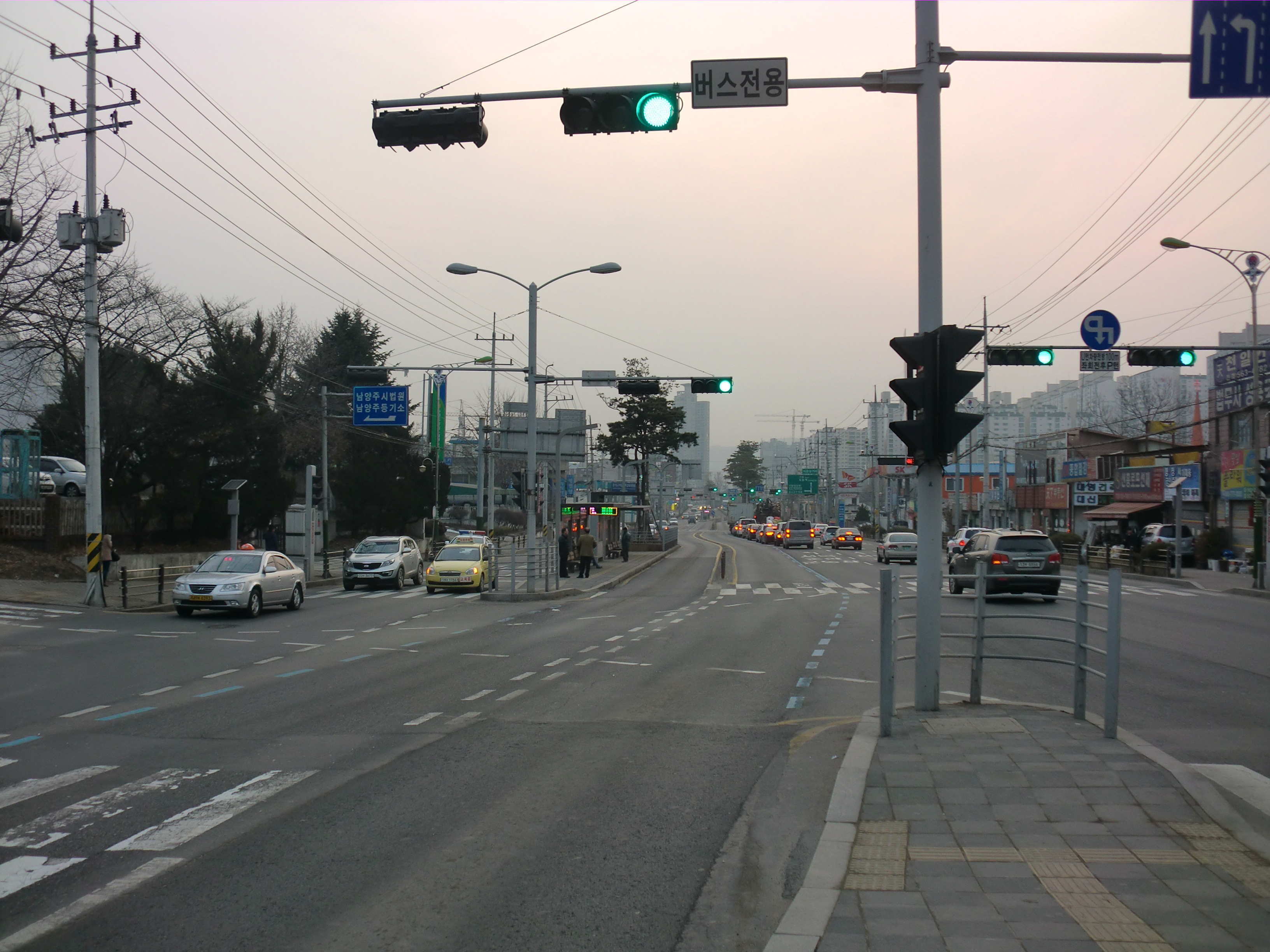 경기도 남양주시에 있는 중앙버스차로